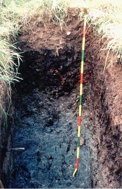 Reductisol de fin de vallée (Quintin, 22)